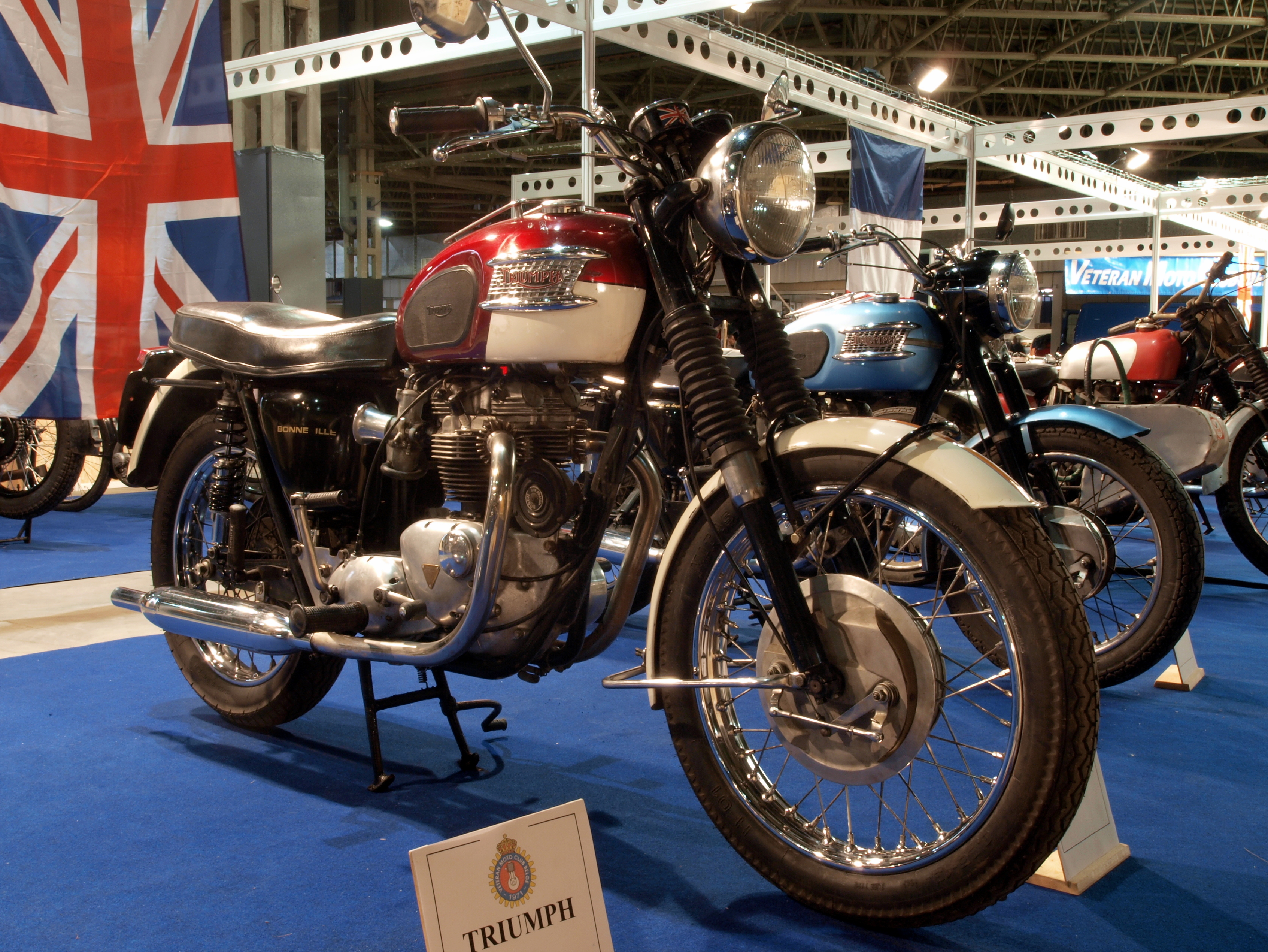 Triumph Bonneville (Bonnie) 650 cc, 1964.